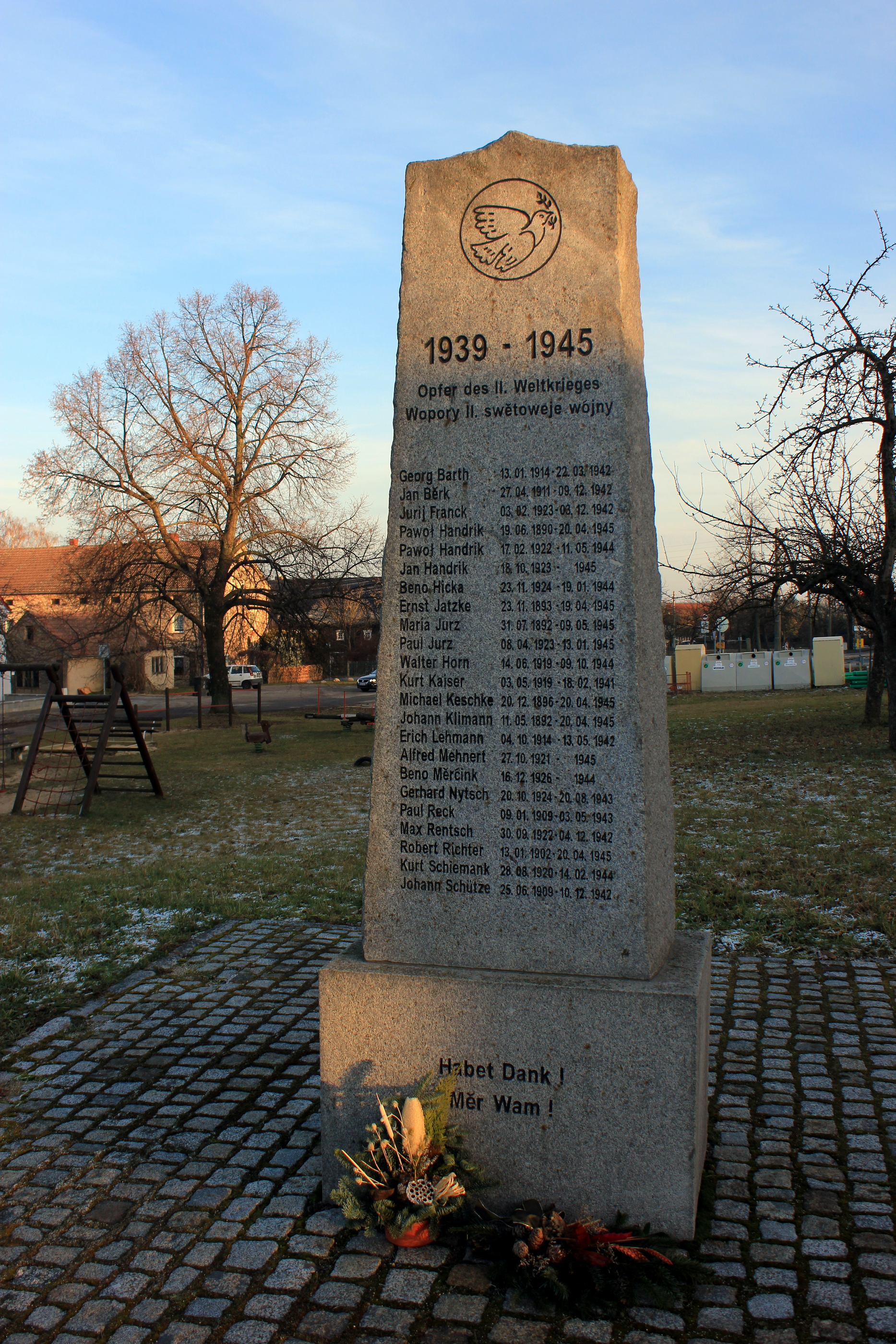 Hornjoserbsce: Wojerski pomnik na Chelnjanskej nawsy.